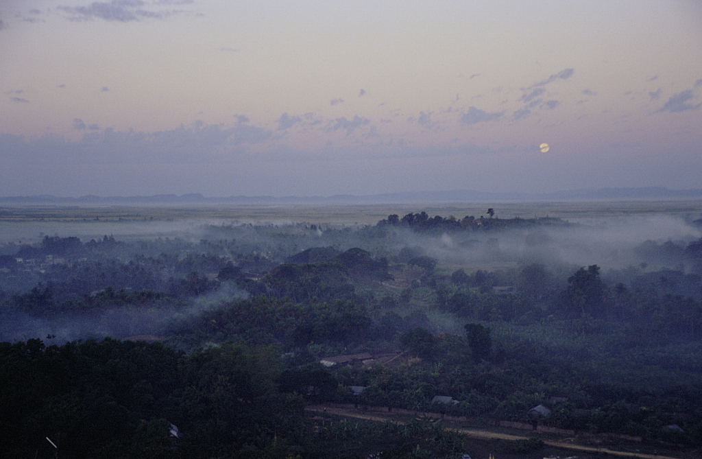 Mrauk U. Burma